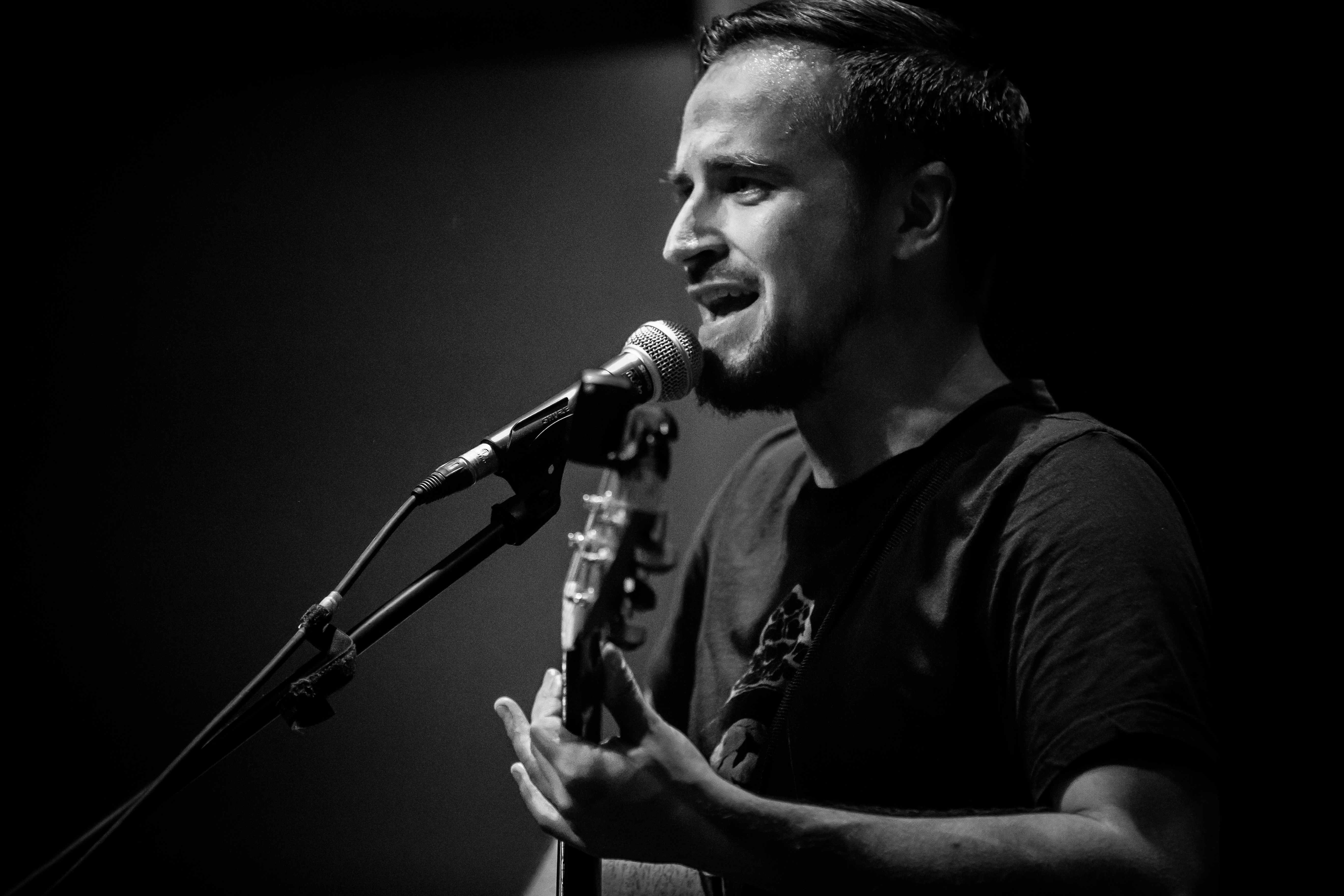 Mitsch Oko Foto: Dita Vollmond